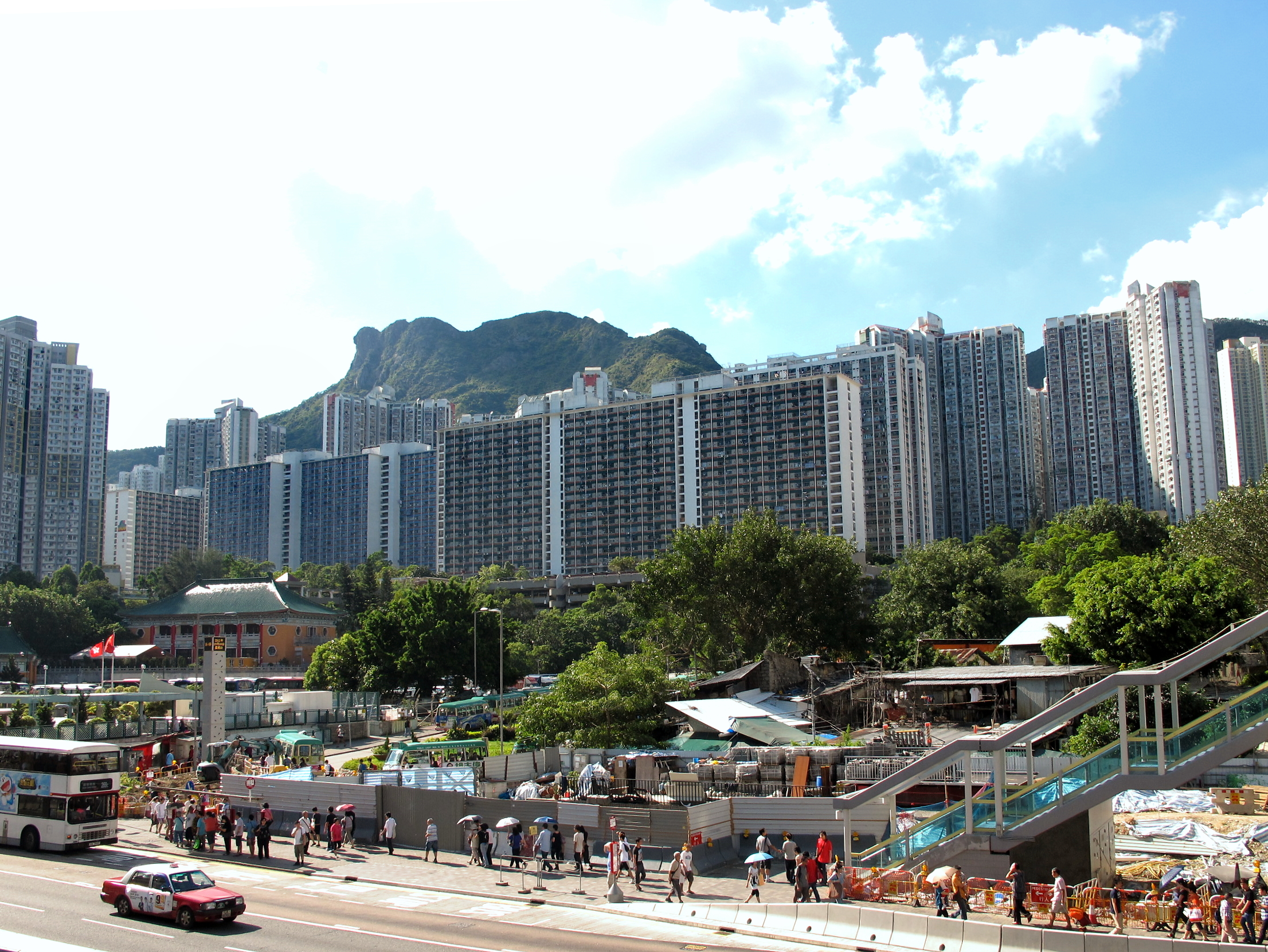 Chuk Yuen Estate